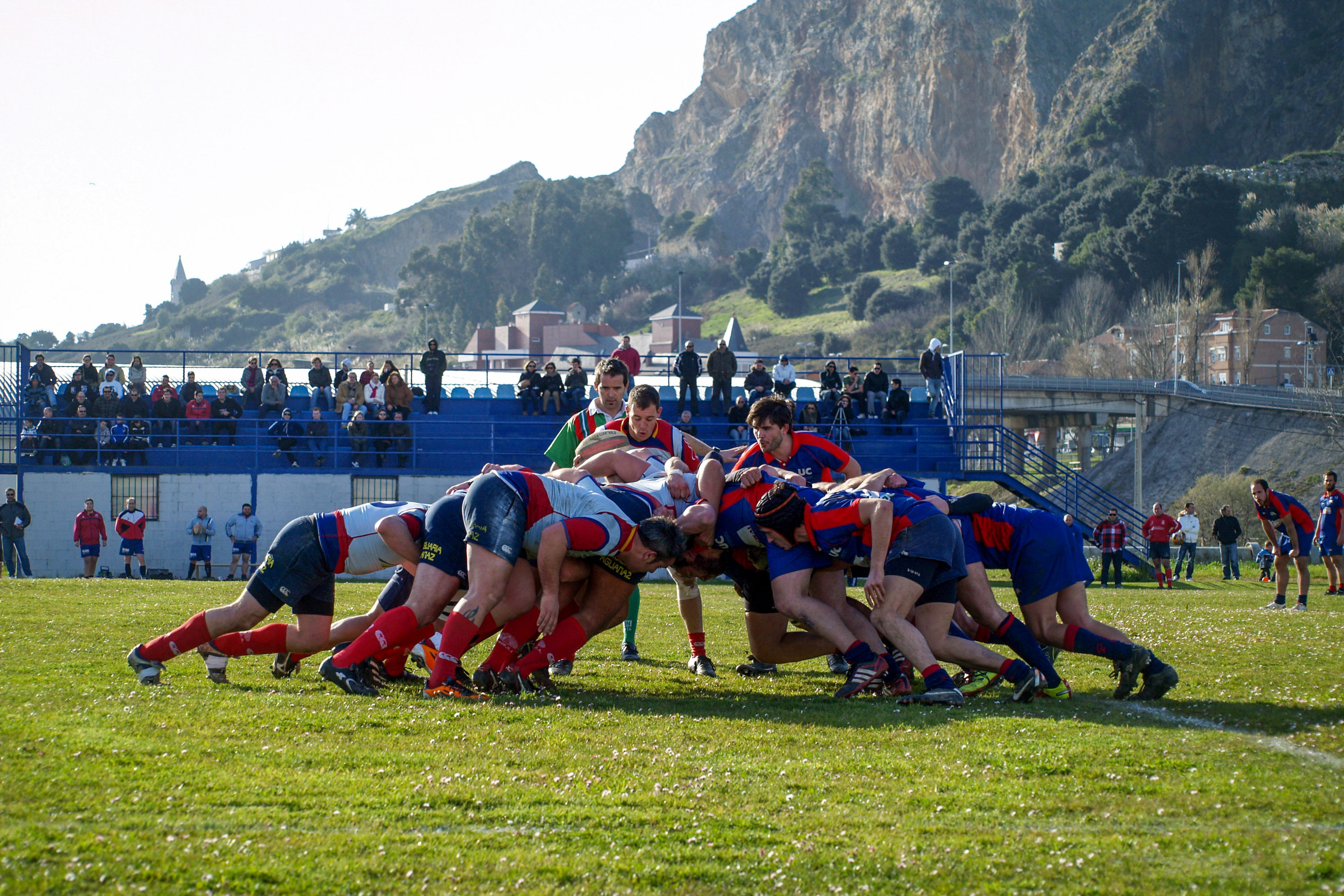 Melé durante un encuentro del Universitario R.C. en el campo de rugby del IES A.G. Linares